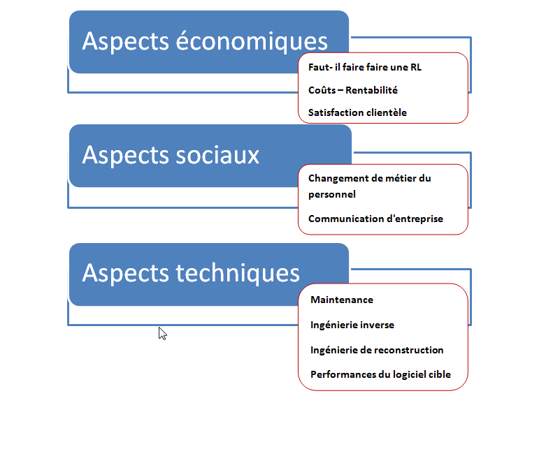 risque de la reingenierie logicielle